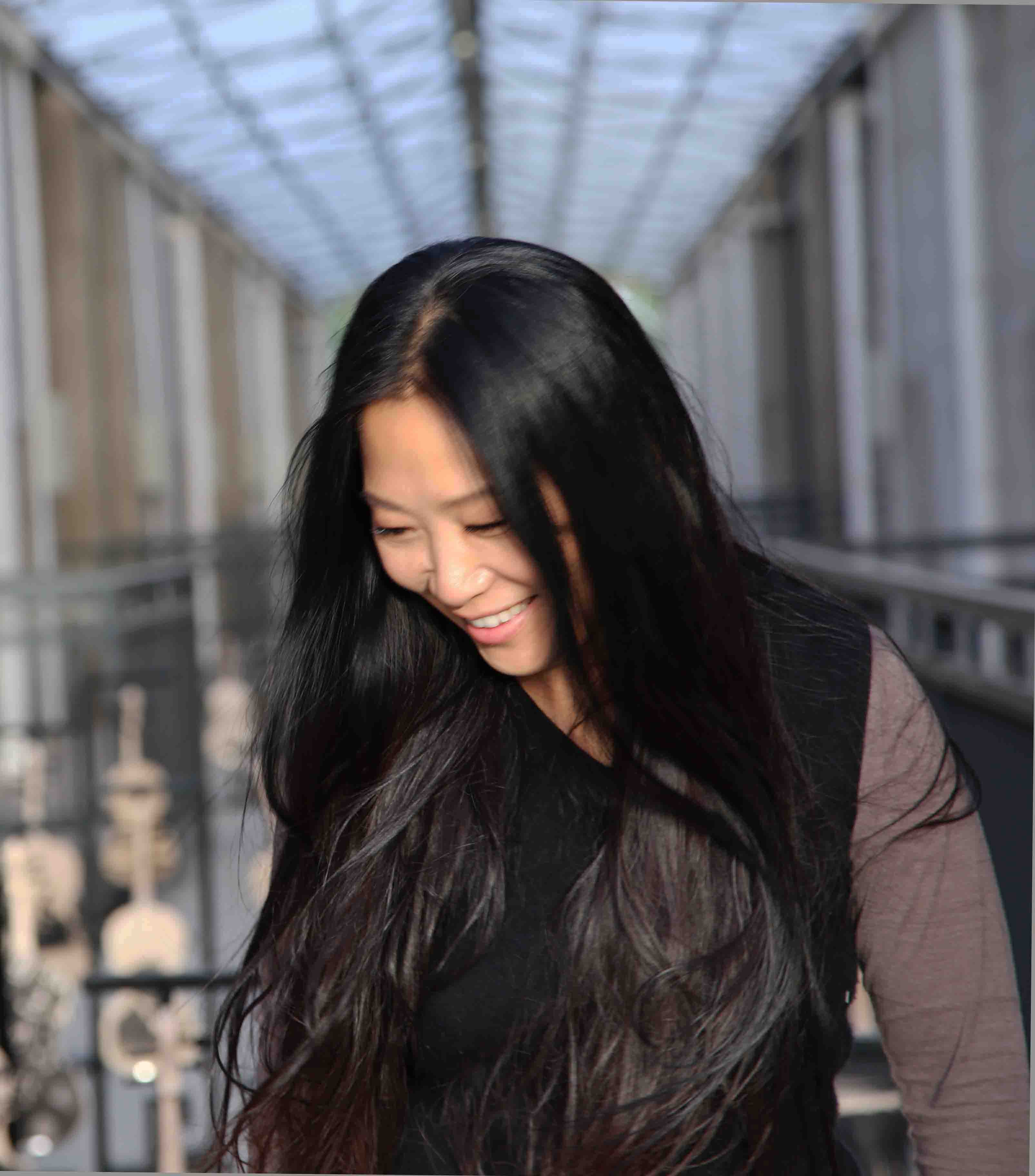 Portrait de Li Chevalier